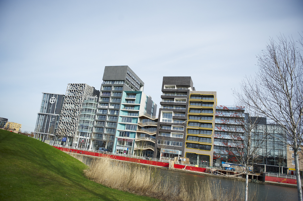 De Zilverparkkade in Lelystad ten tijde van de oplevering van Jocator en Klusor